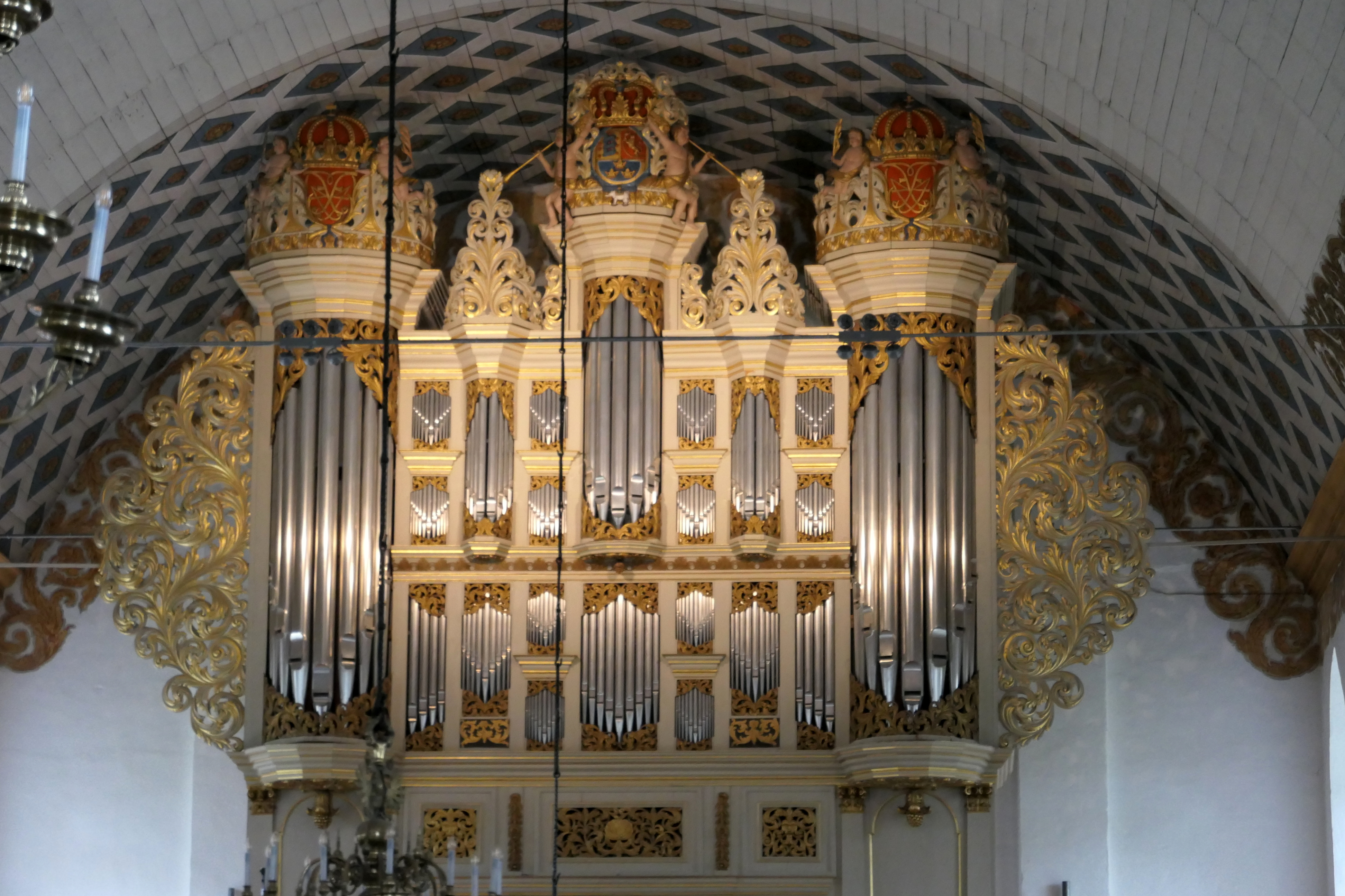 Orgel der Christkirche Rendsburg, Kreis Rendsburg-Eckernförde, Schleswig-Holstein, Deutschland